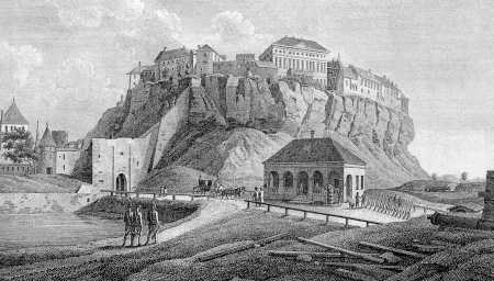 Vaade Toompeale mere poolt